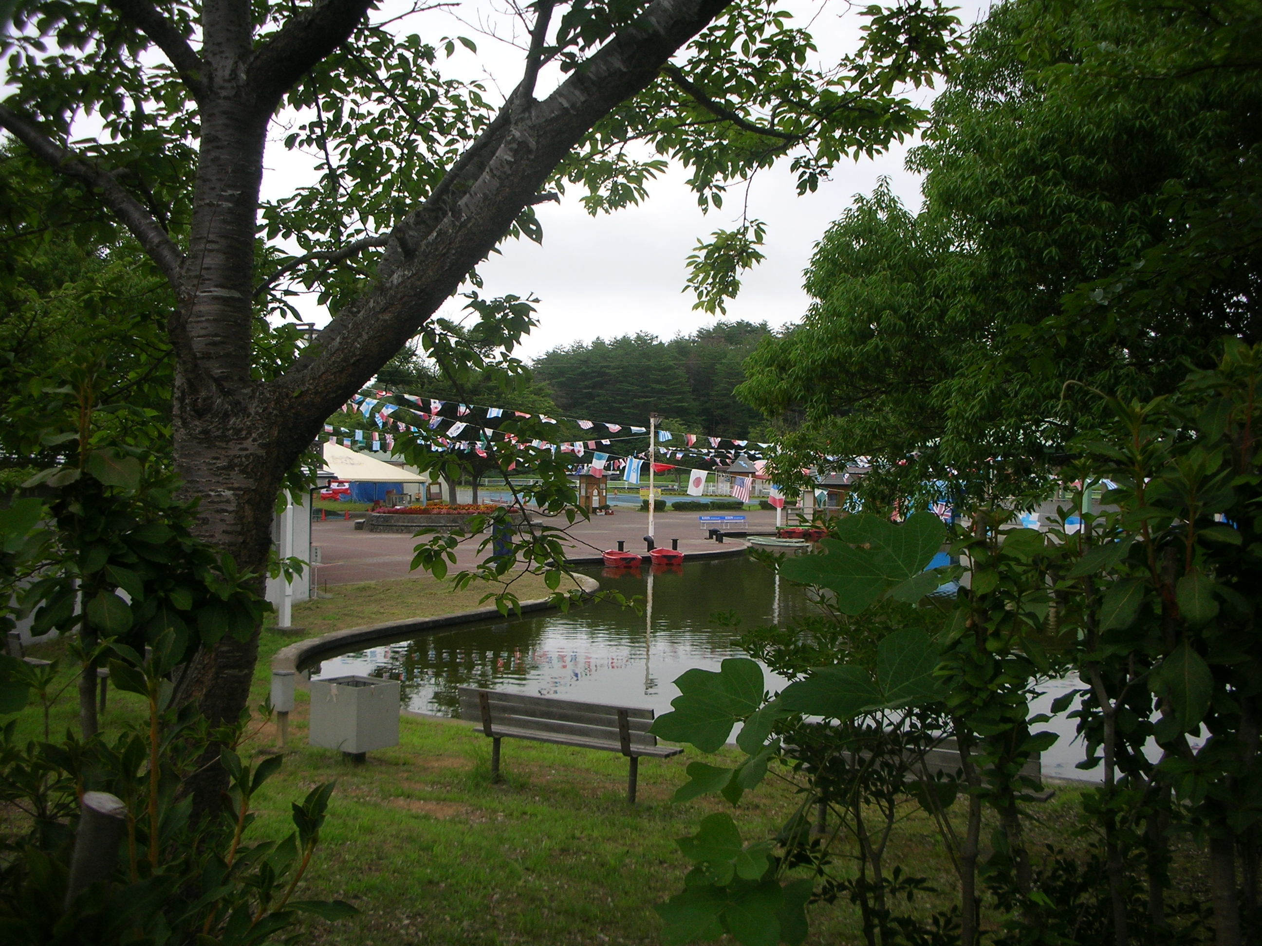 チャチャワールドいしこし